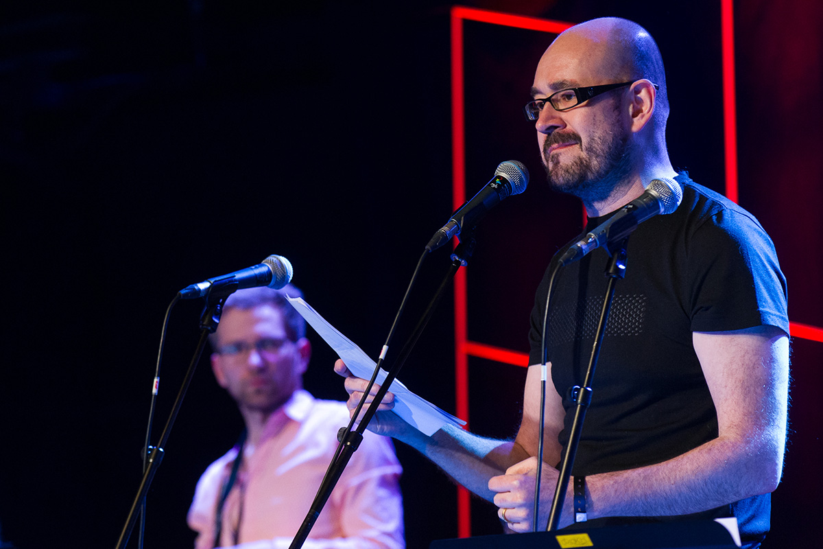 Asko Künnap ja Estonian Dream Big Band. Tallinn, Jazzkaar 2015